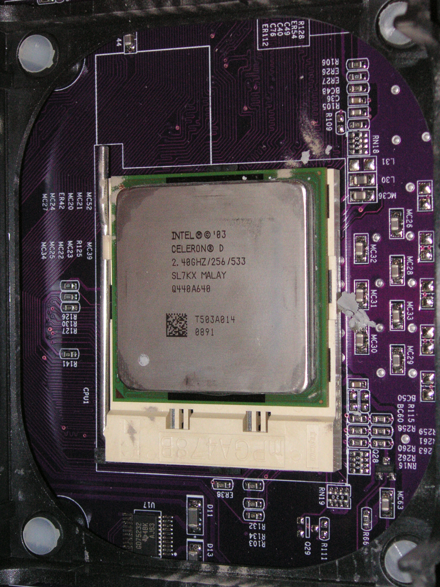 Процессор Intel Celeron D, частота 2,4 ГГц. Расположен в сокете mPGA478B. Фотография процессора Intel Celeron D (частота 2,4 ГГц), расположенного в сокете mPGA478B. Видны крепления кулера, остатки термопасты и следы мелкой пыли.